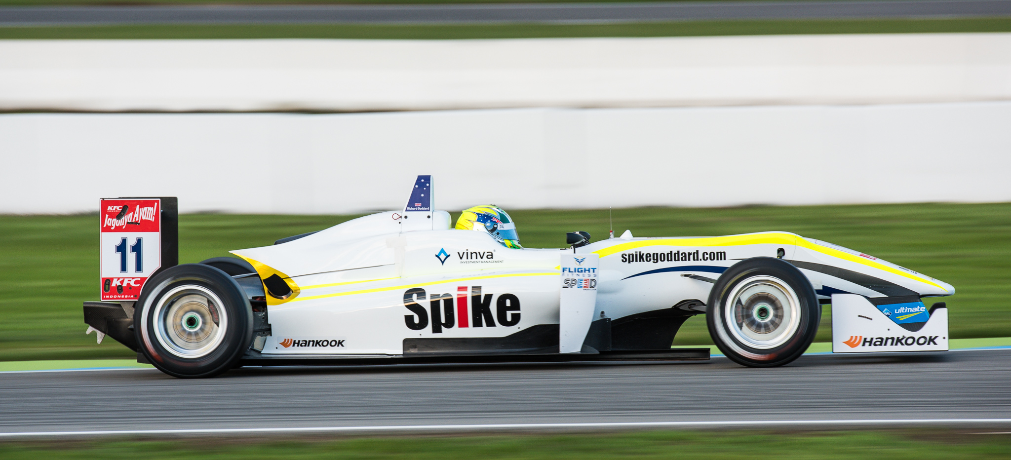 DTM,Dallara F312,Deutsche Tourenwagen Masters,F3 FIA European Championship,FIA Formel 3 Europameisterschaft,Hockenheimring,Motorsport,NBE,Neil Brown Engineering,Richard Goddard,Spike Goddard,ThreeBond with T-Sport